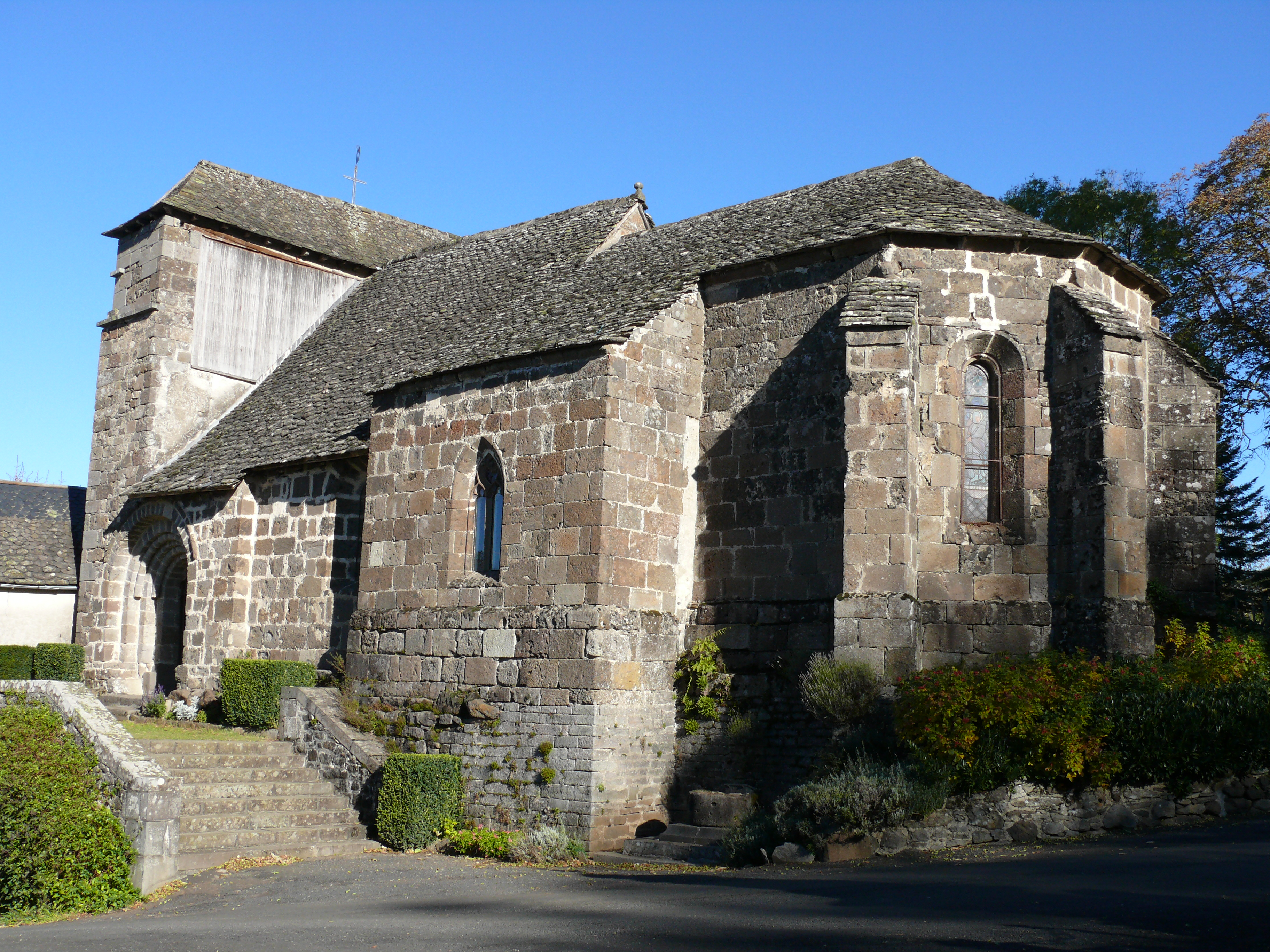 Méallet - Eglise Saint-Georges .